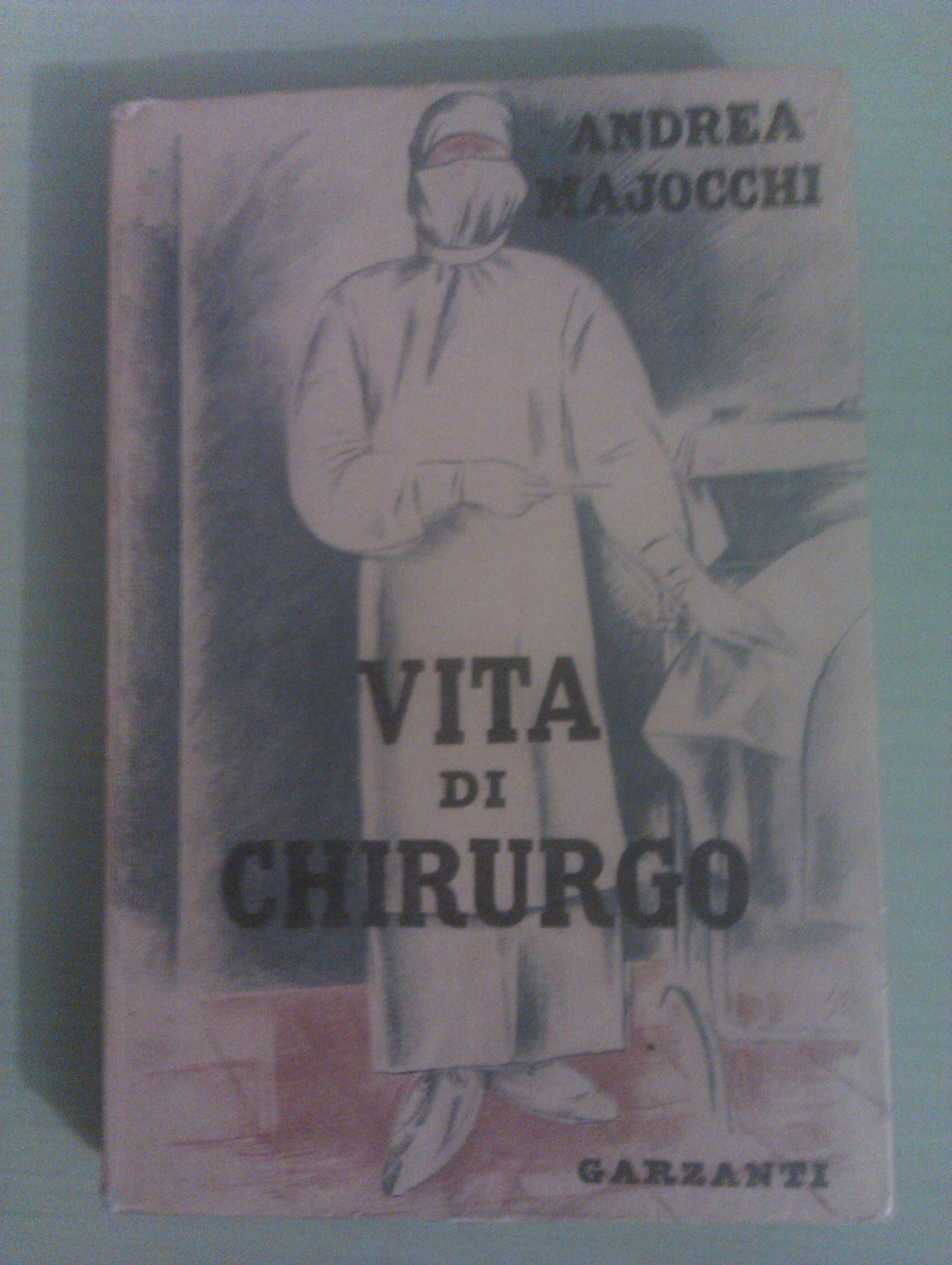 Immagine copertina del libro Vita di Chirurgo, Garzanti editore, Milano, 1935, 332 pagine - pp. 94-107 di Andrea Majocchi